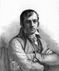 Joachim Lebreton (1760-1819). Gravure de Charles-Victor Normand (1814-18??) d'après François Gérard (1770-1837)